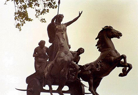 Monument en bronze de Boudicca au pont de Westminster. Jean-Claude Even, 1982